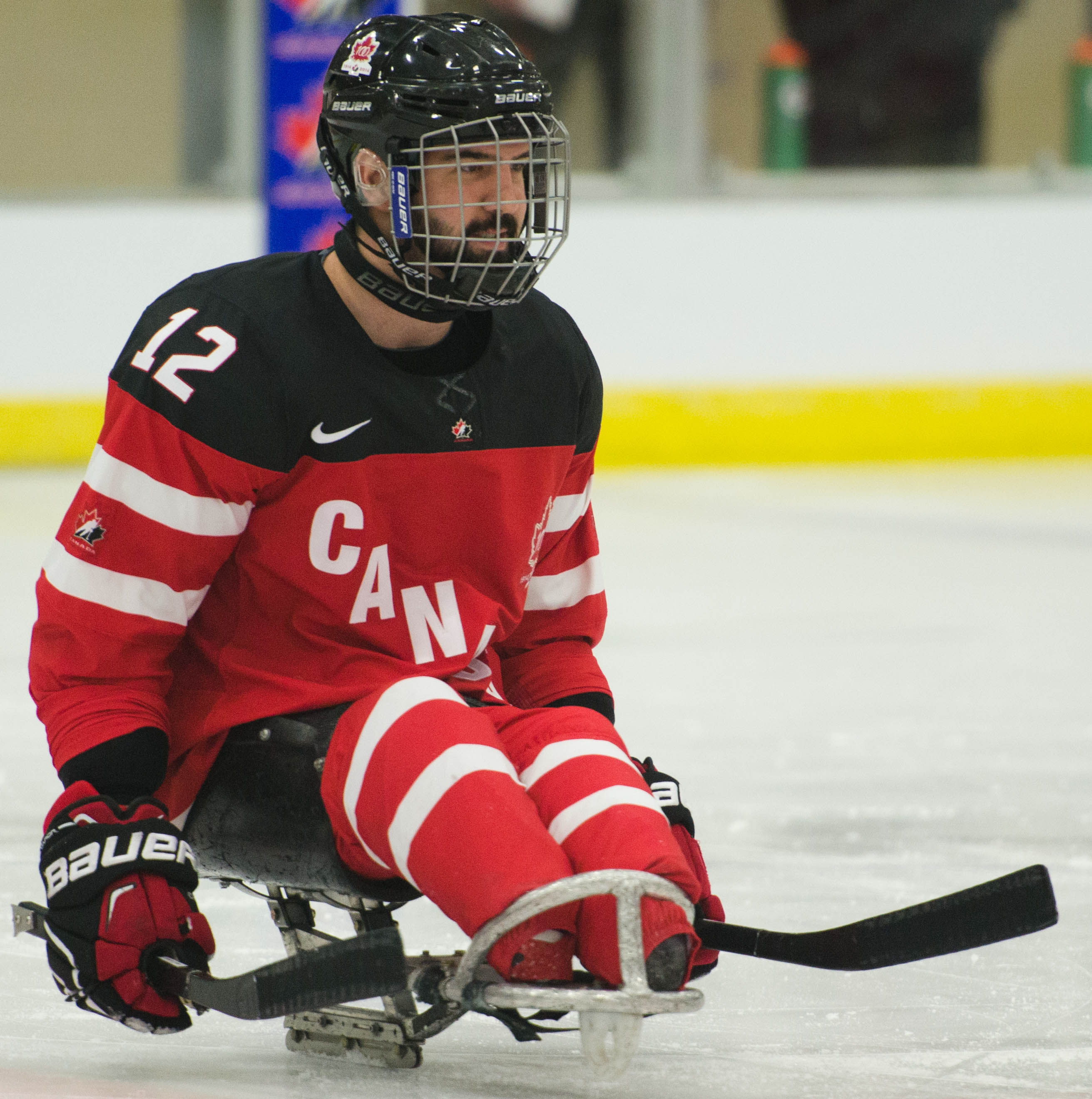 Greg Westlake, 2015